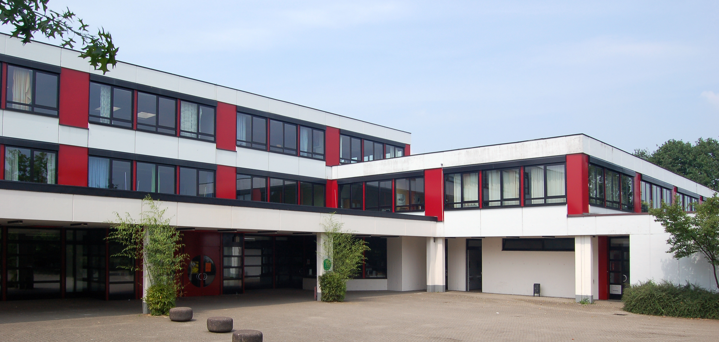 Städtisches Meerbusch-Gymnasium im Ortsteil Strümp